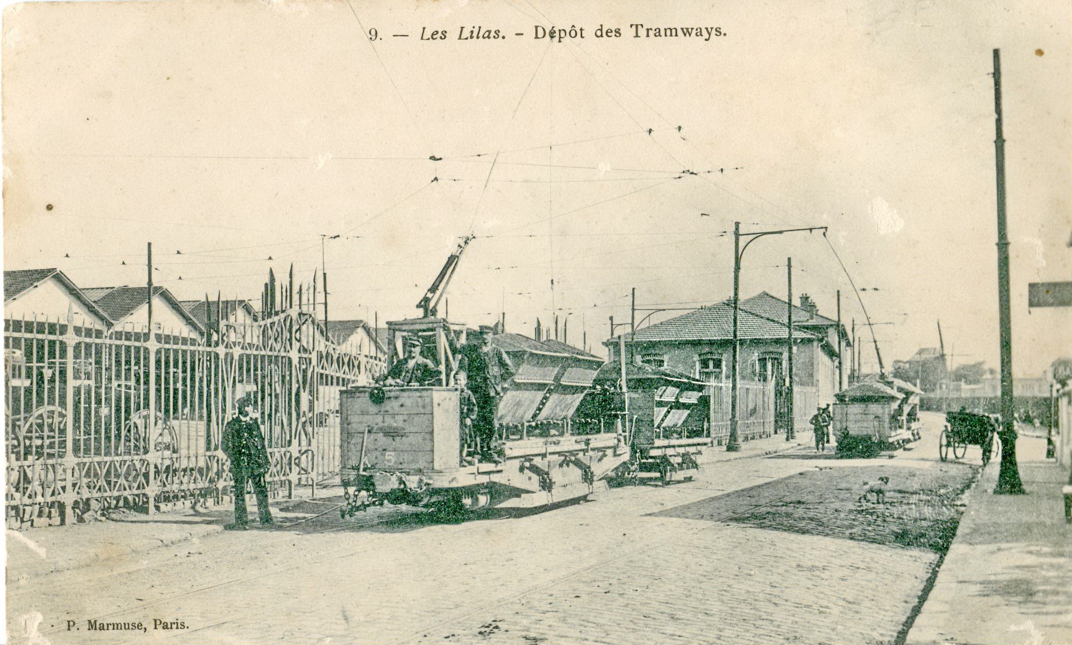 Carte postale ancienne éditée par Marmuse : LES LILAS - Dépôt des Tramways Dépôt de Floréal de la Compagnie des tramways de l'Est parisien